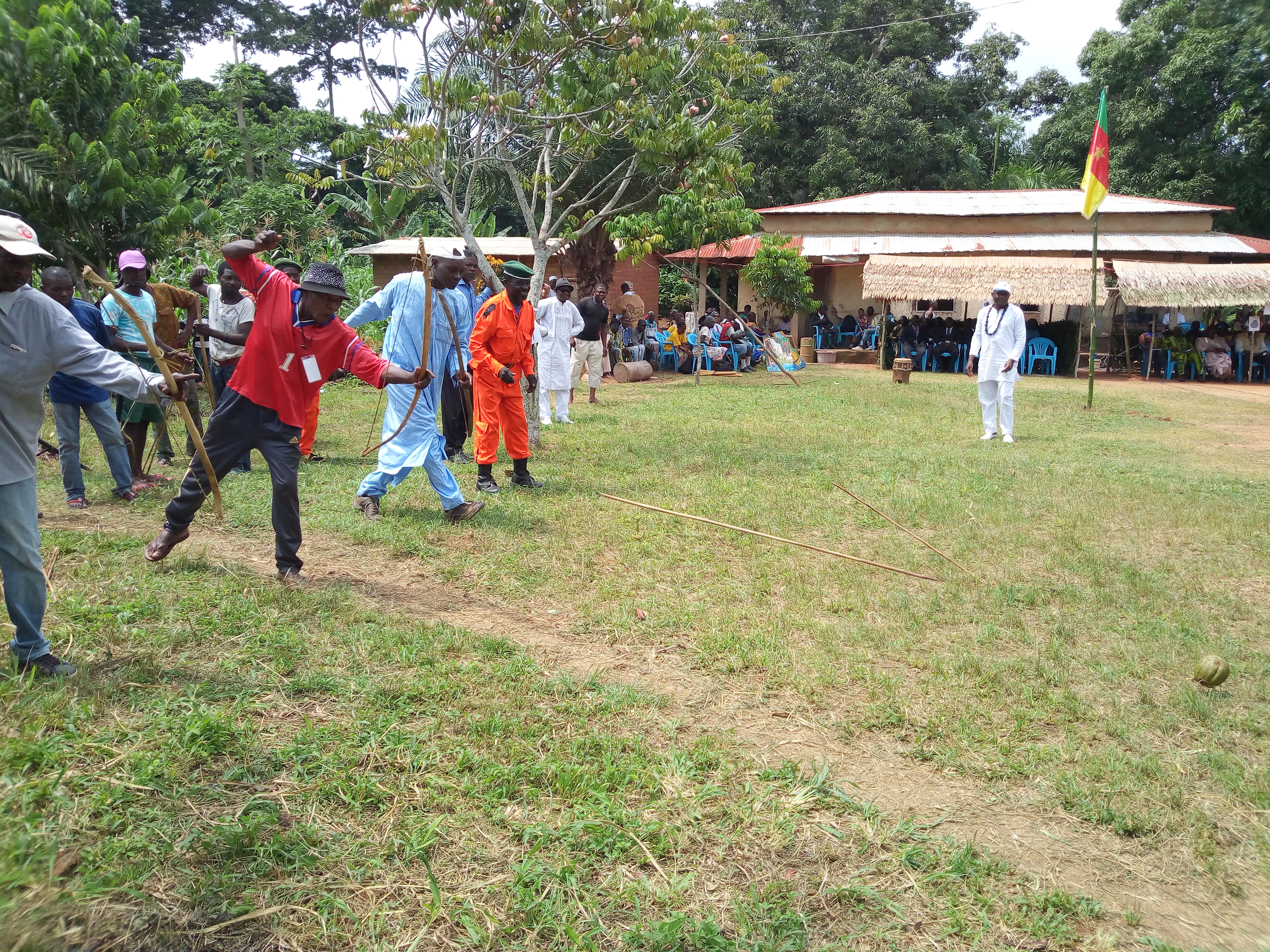 Kákámba est un jeu concours de tir à l'arc sur une cible mouvante. Les adversaires se mettent d'un côté, à égale distance, puis une boule appelée "kákámba" est lancée à une vitesse moyenne. C'est le tireur qui la touche le premier qui sera le meilleur. Ce jeu, est pratiqué ici lors de la première édition du festival Mabussa râ Tumu râ Waki (Ébullition Culturelle Uki) qui s'est déroulé du 13 au 15 juillet 2018 au village Egona 1, au lieu dit Fuata dans l’Arrondissement de Bafia. C'est un jeu qui préparait et prépare l'adresse à la chasse, les populations pratiquant encore cette activité pour avoir les protéïnes animales. This is an image with the theme "Play" from: Cameroon